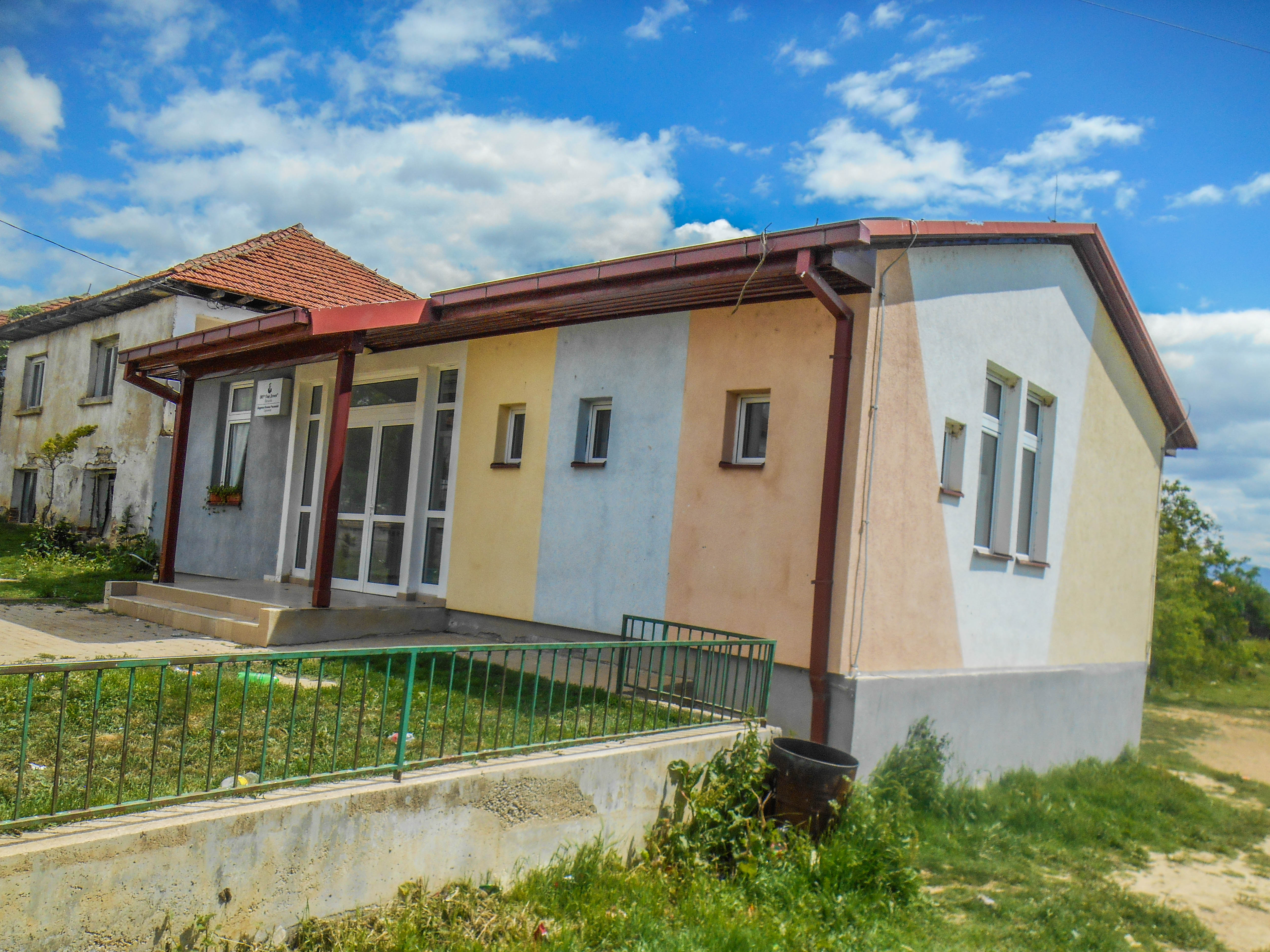 Основно училиште „Гоце Делчев“ - Едрениково